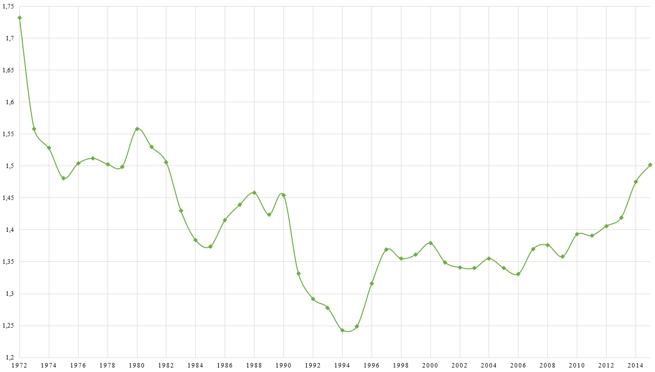 СКР Германии